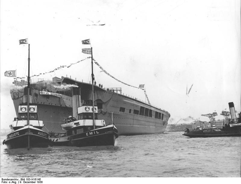 Stapellauf des Flugzeugträgers "Graf Zeppelin" in Kiel UBz: den Flugzeugträger nach dem Stapellauf. Scherl-Bilderdienst, Fot. Ho., 9.12.38, Flugzeugträgers "Graf Zeppelin" nach dem Stapellauf Bereits kurze Zeit nach dem feierlichen Stapellauf des ersten Flugzeugträgers der deutschen Kriegsmarine begannen Schlepper, den stählernen Koloss zum Ausrüstungskai der Deutschen Werke zu geleiten (unser Bild), wo der mächtige Schiffsrumpf vertäut wurde. Scherl-Bilderdienst, 9.12.38